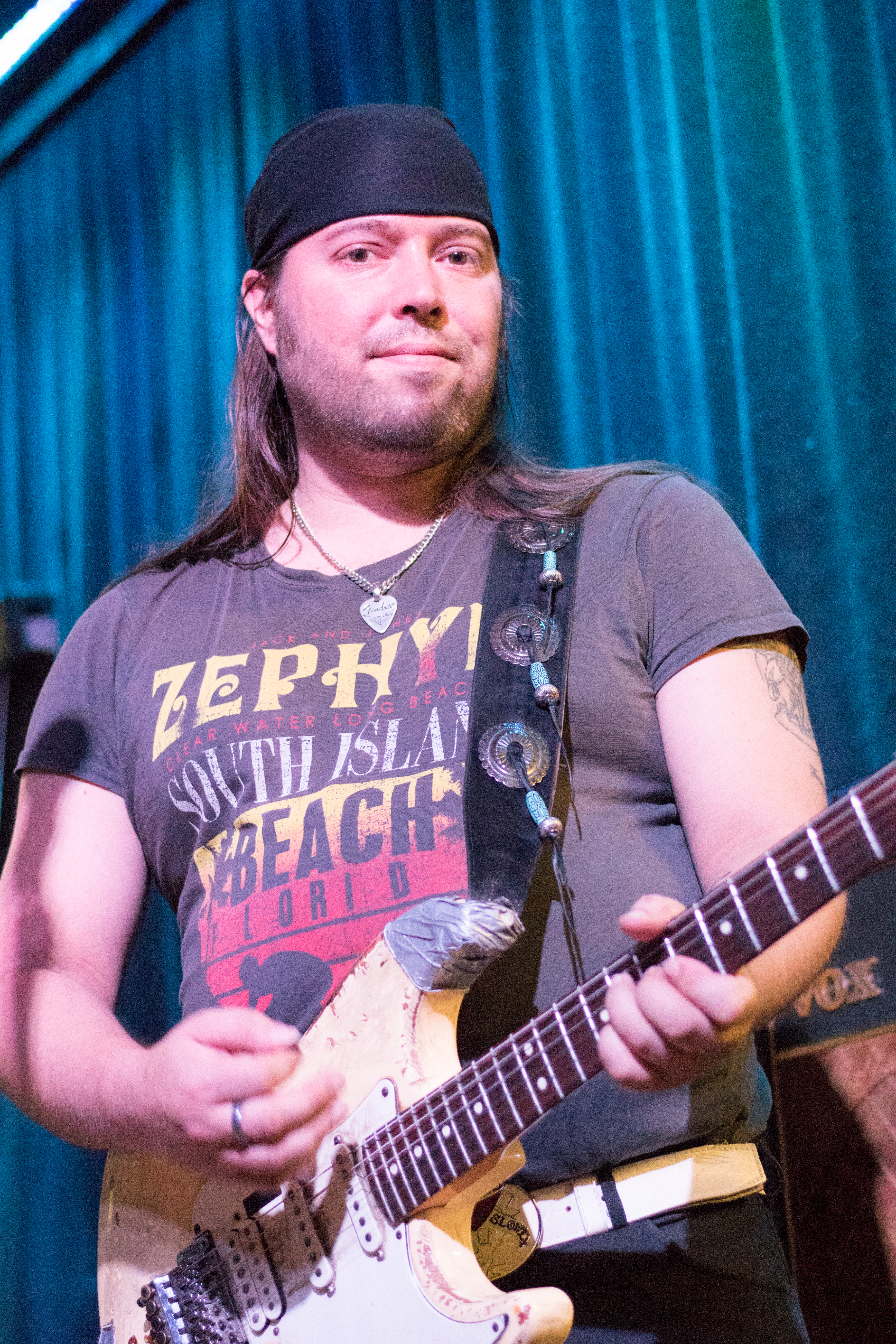 Timo Luostari suomalainen kitaristi